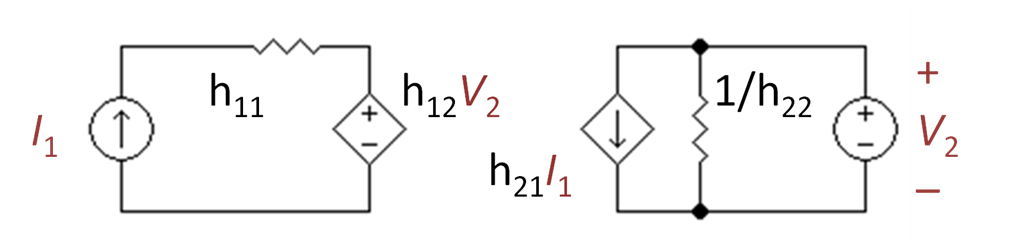 Two-port h-equivalent circuit